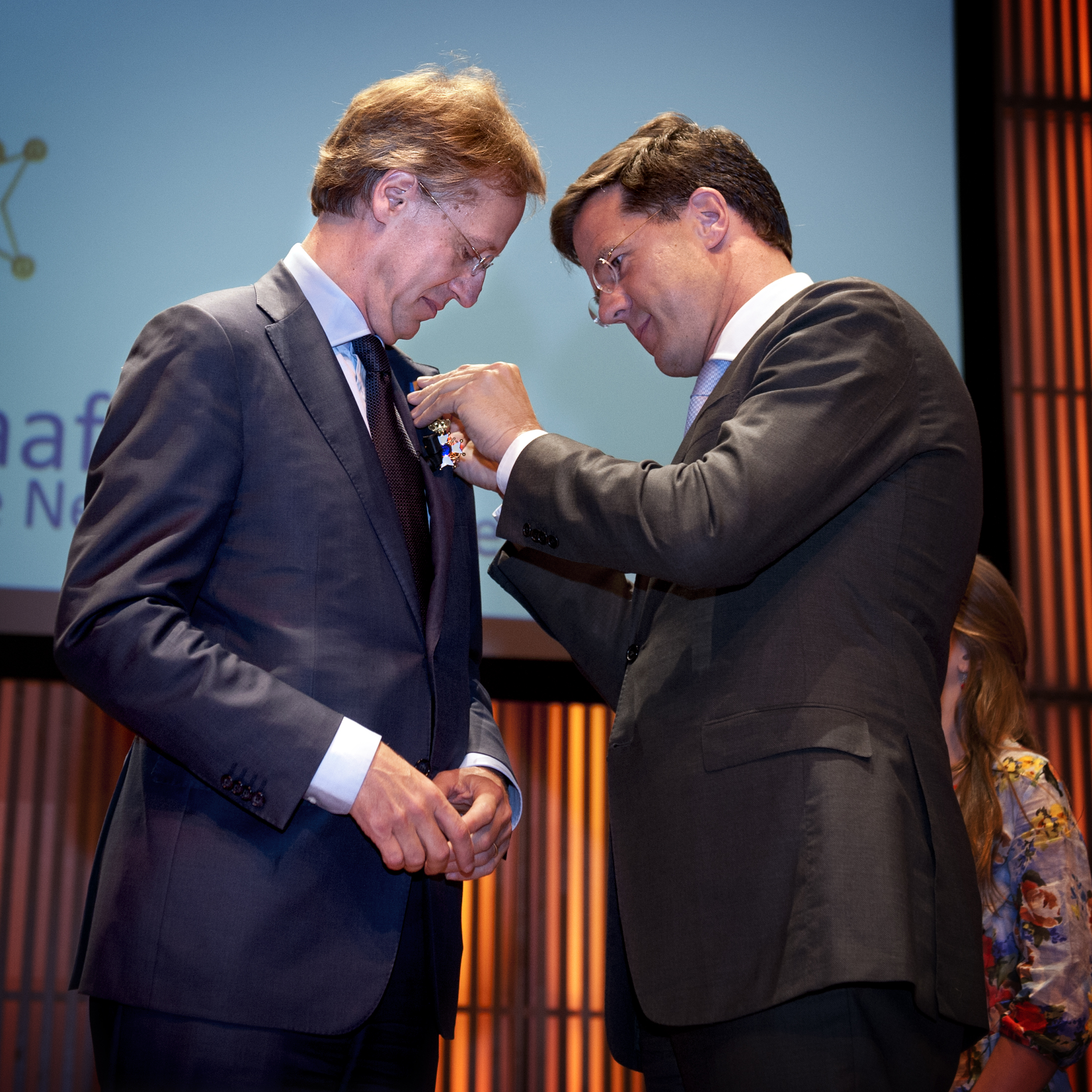 Robbert Dijkgraaf is vanmiddag benoemd tot Ridder in de Orde van de Nederlandse Leeuw voor zijn grote verdiensten voor de wetenschap in Nederland. Minister-president Rutte reikte de onderscheiding uit. Hij werd hierbij geassisteerd door de dochter van Dijkgraaf, de elfjarige Charlotte. Dijkgraaf nam vandaag afscheid als president van de Koninklijke Nederlandse Akademie van Wetenschappen. Per 1 juli wordt hij directeur van het Amerikaanse Institute for Advanced Study in Princeton. Lees hier de toespraak van minister-president Rutte bij het afscheid